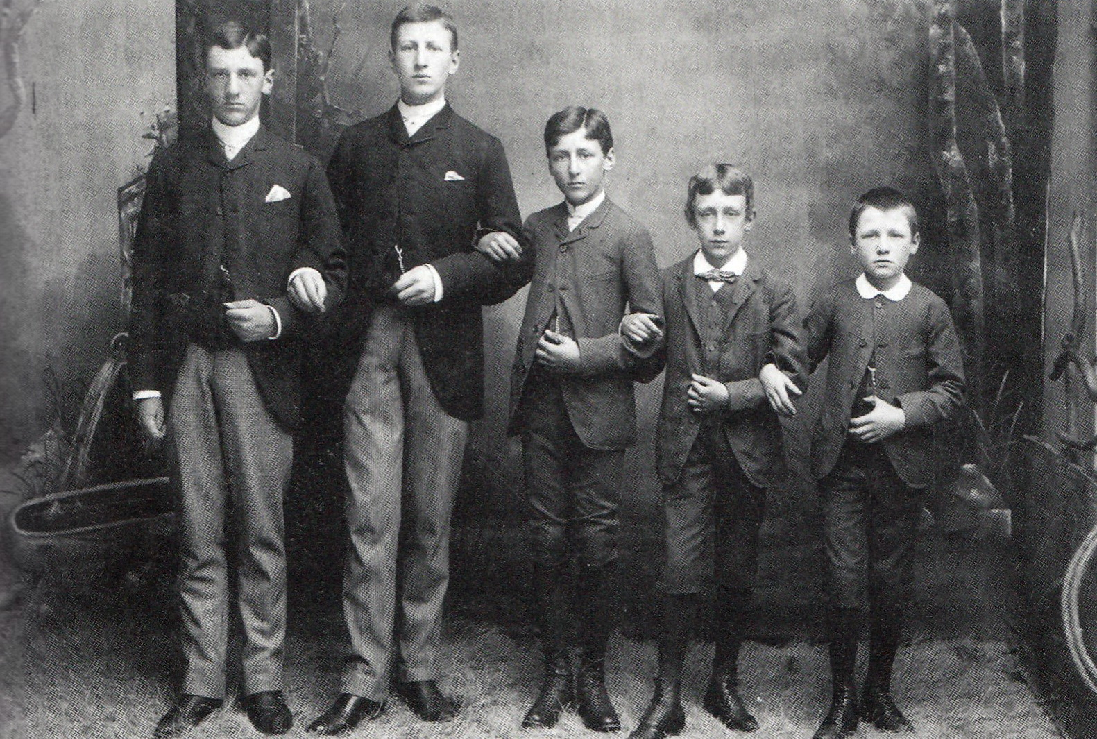 Groepsportret van de vijf zonen van de Maastrichtse industrieel Gustave Regout en zijn Belgische vrouw Louise Pétry. Van links naar rechts (op leeftijd): Gustaaf (II), Edmond, Alfons, Adolf en Eduard. Familiearchief Regout, RHCL Maastricht.